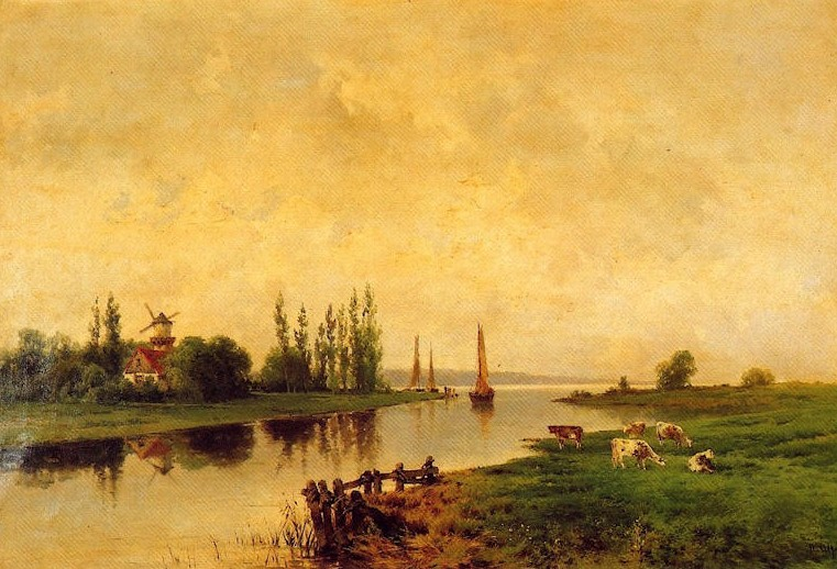 Nicolás Alfaro y Brieva (1826-1905): Pintor canario, violinista y académico. Romántico plenairista en su isla natal, Tenerife, y en Cataluña (donde entró en contacto con la escuela paisajística de Olot); fue uno de los primeros pintores canarios que trató el paisaje como género independiente.